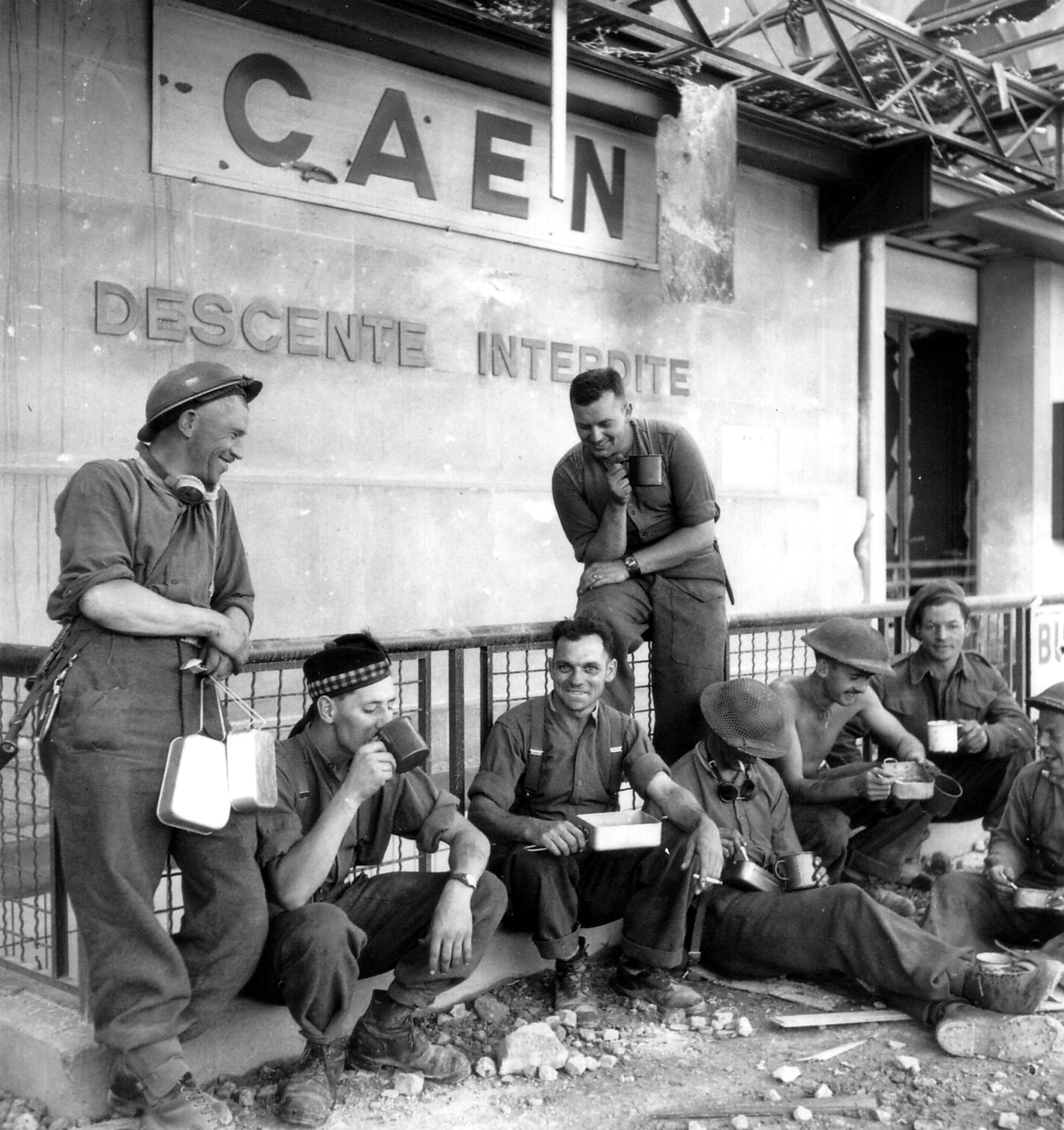 Les hommes de la Stormont, des Régiments Dundas et Glengarry prennent un repas à l'extérieur de la gare de Caen.